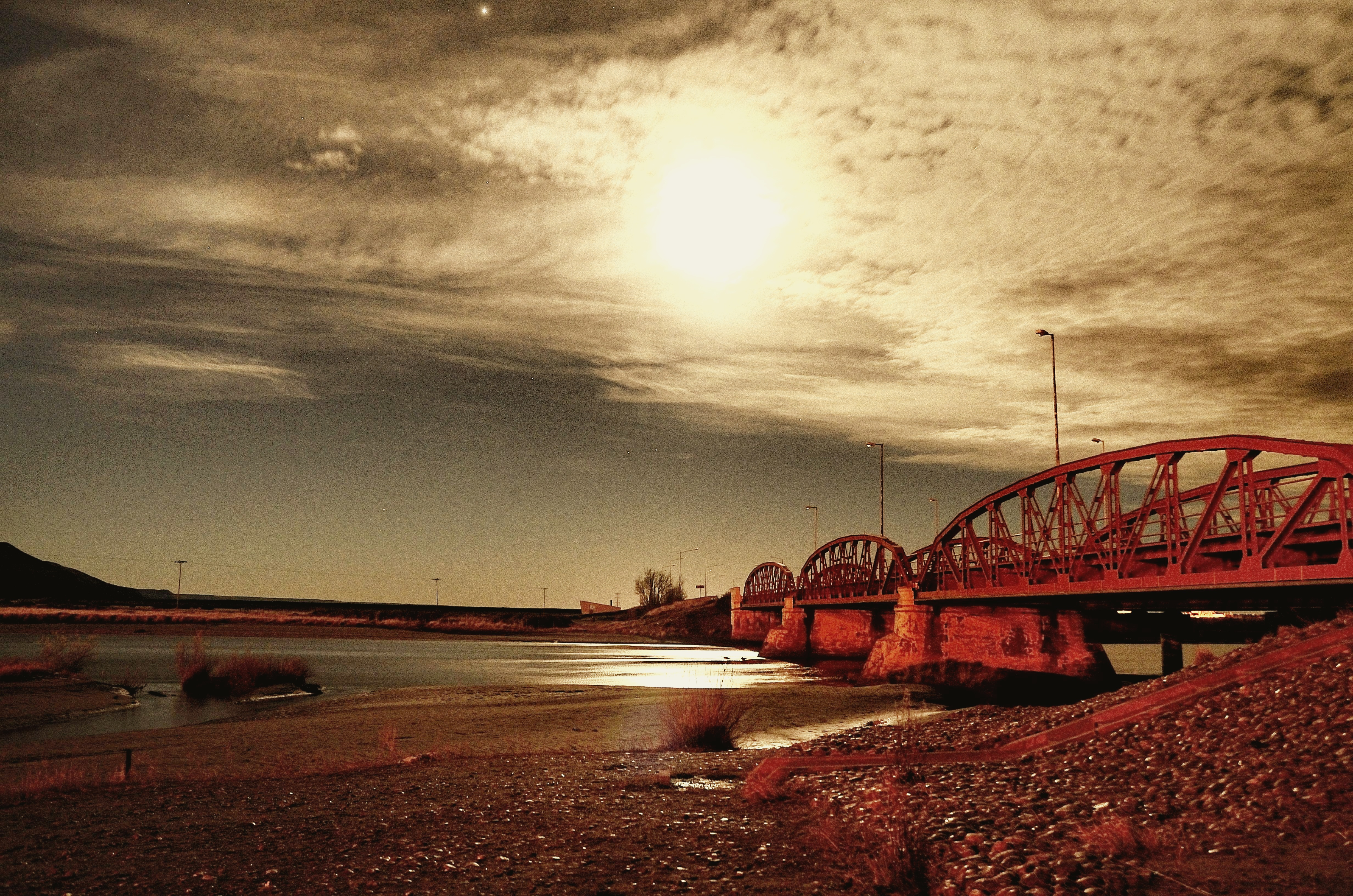 Puente del Río Gallegos, en el paraje Güer Aike Departamento Güer Aike provincia de Santa Cruz. Ubicado aproximadamente en el km 2500 de la ruta nacional Nro.3 hacía el sur .